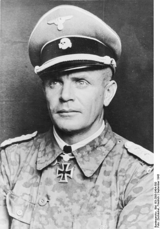 SS-Standartenführer Heinz Harmel, Regimentskommandeur in der SS-Panzer-Grenadier-Division "Das Reich" erhielt vom Führer als 296. Soldat der deutschen Wehrmacht das Eichenlaub zum Ritterkreuz des Eisernen Kreuzes verliehen. (12.9.1943). SS-PK-Aufn.Kriegsber. Zschäckl-Atl. 13.9.1943 [Herausgabedatum] Information added by Wikimedia users.SS Standartenführer Heinz Harmel, regimental commander of the SS Panzer-Grenadier-Division "Das Reich" being awarded Oak Leaves to the Knights Cross of the Iron Cross, as 296th soldier of the German Wehrmacht on 12/09/1943.